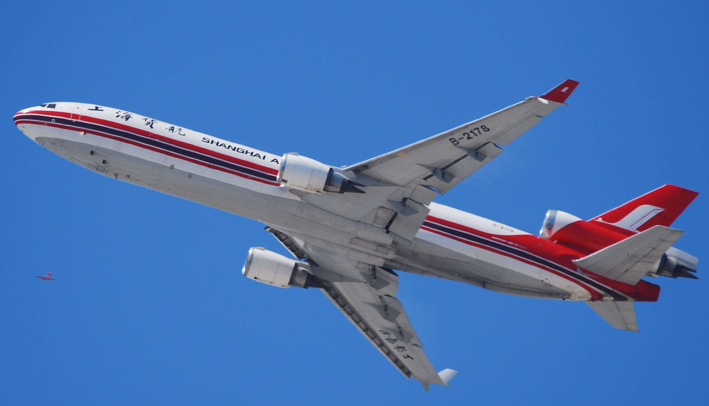 SHANGHAI MD-11